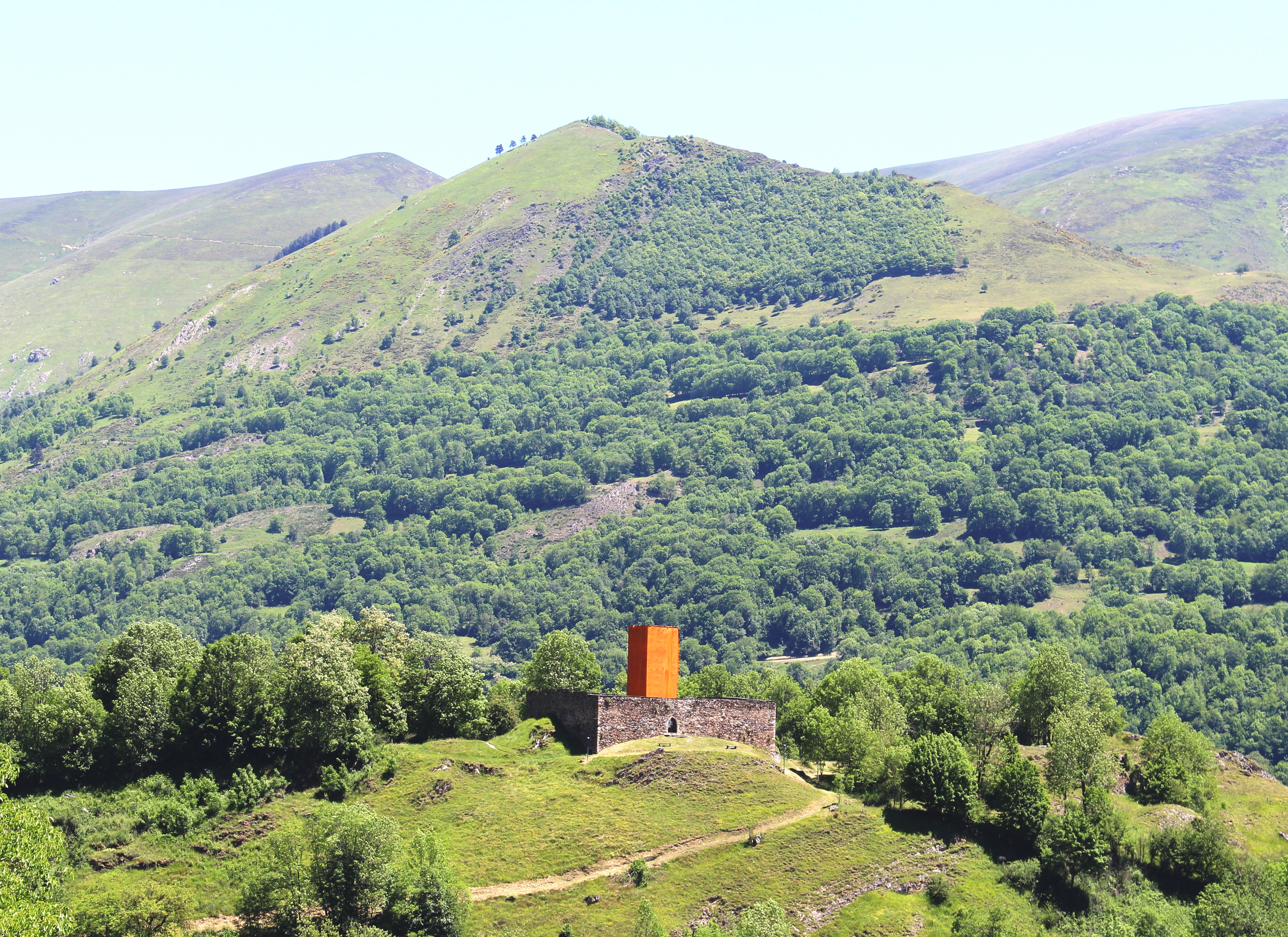 Château de Génos (Hautes-Pyrénées)